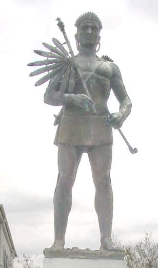 Atakapa Indian monument